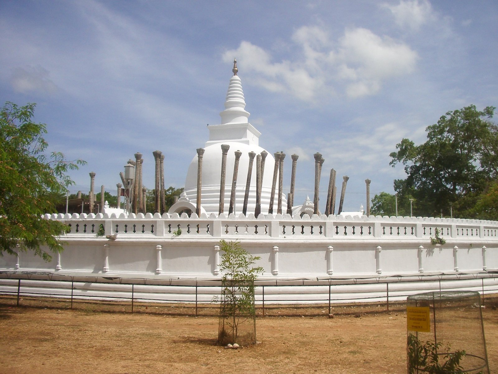 Estopa prop de la gran pagoda d'Anuradhapura, foto feta per J. Ollé el juliol del 2006